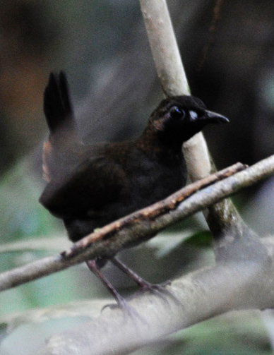 Tétéma coq-de-bois (Formicarius analis)